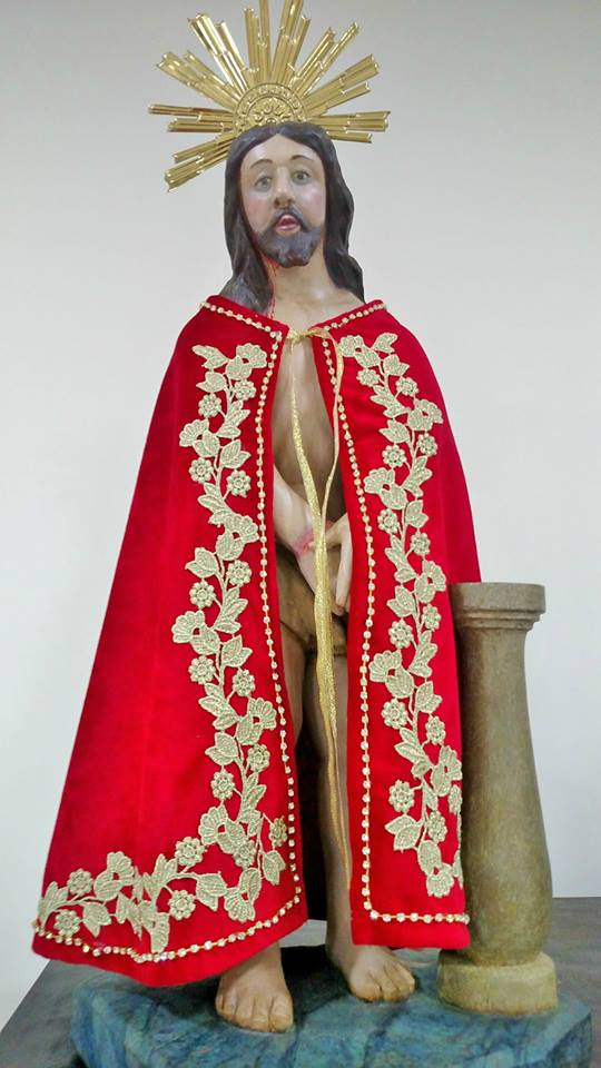 Imagem encontrada em 1781